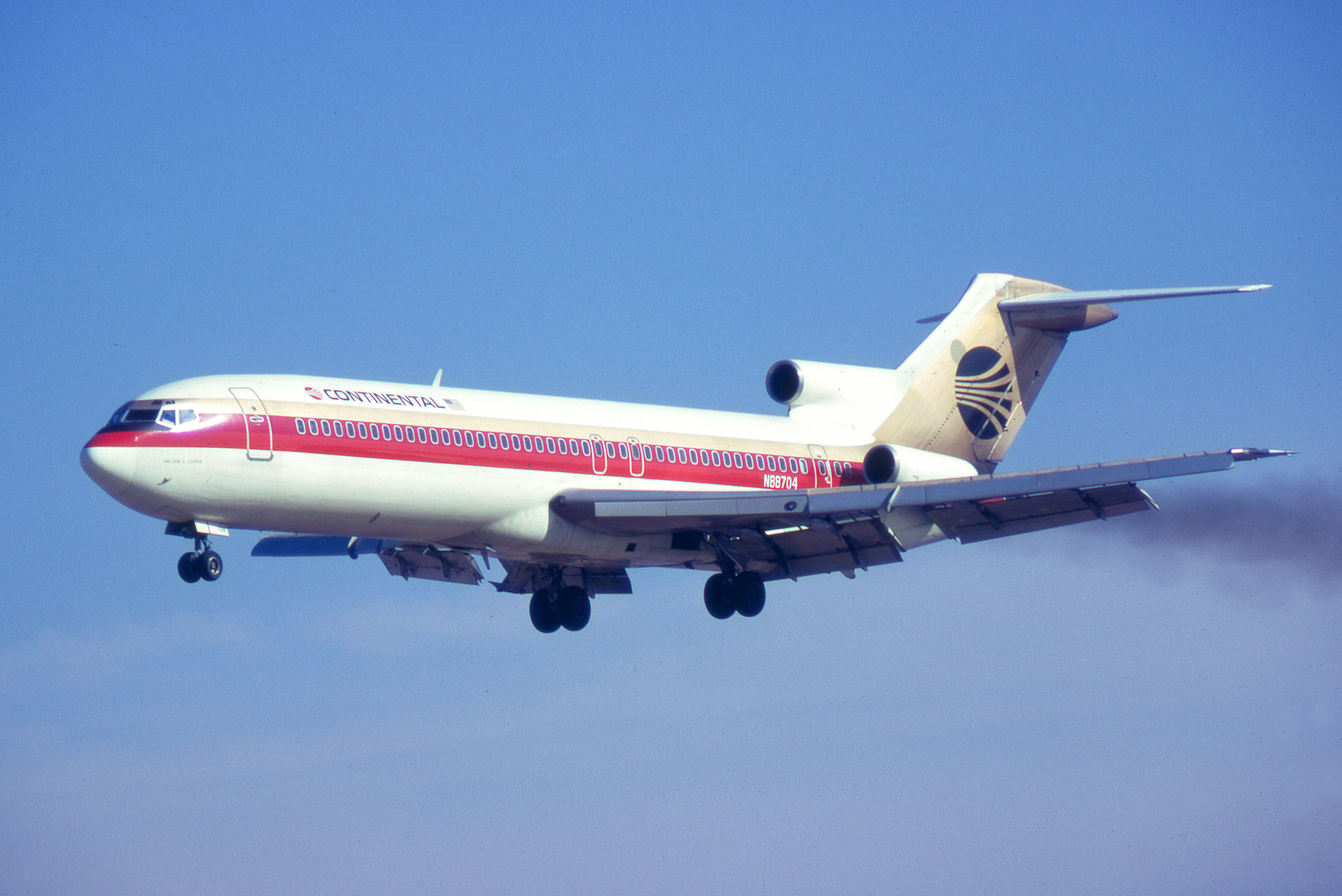 LAX 1970